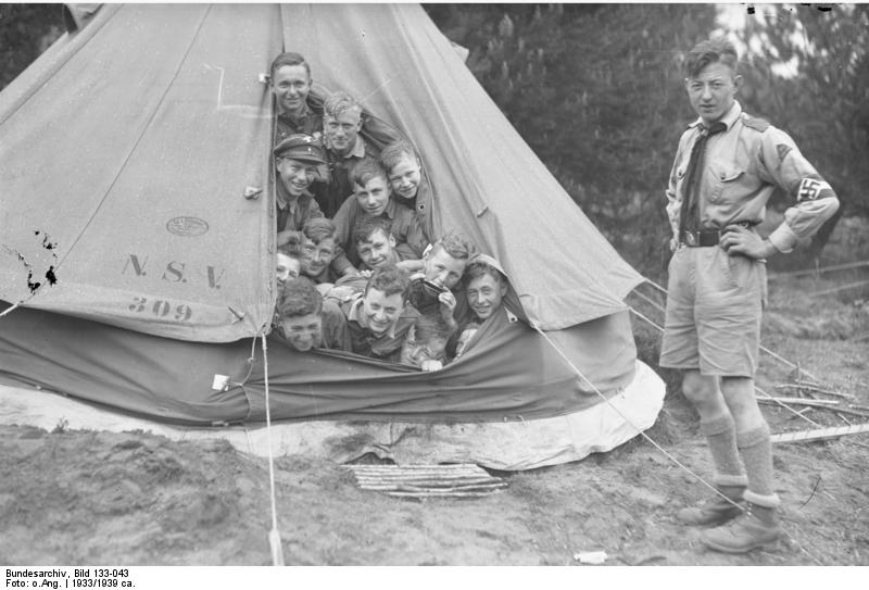 Hitlerjugend, Zeltlager Hitlerjugend.- Im Zeltlager.